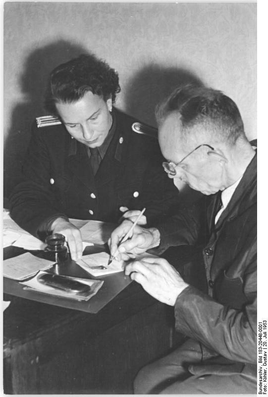 Zentralbild Köhler 20.7.1953 Interzonenpässe werden schnell ausgestellt Entsprechend den Beschlüssen der Regierung über die Erleichterung des Interzonenverkehrs werden alle Anträge von den Volkspolizei-Inspektionen schnell und unbürokratisch bearbeitet. Auf der Volkspolizei-Inspektion Berlin-Treptow, Johannisthal, Sterndamm. UBz: Der Rentner Paul Kern aus Berlin-Johannisthal, Ostmarkstrasse 4, erledigt die letzten Formalitäten. Er will seine Kinder und Enkelkinder in Düren-Rheinland besuchen. "Als ich vor zwei Jahren einen Pass beantragte, wurde er mir abgelehnt, um so grösser ist heute meine Freude, dass ich so schnell und unbürokratisch die Genehmigung zur Reise nach Düren erhielt", sagte Paul Kern.